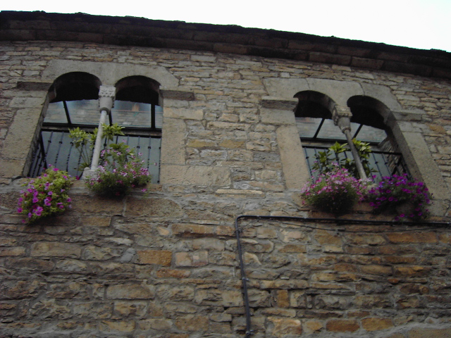 Ventanas de Casa Bielsa, en la Calle Mayor de l'Aínsa, en pleno casco antiguo de la localidad Oscense